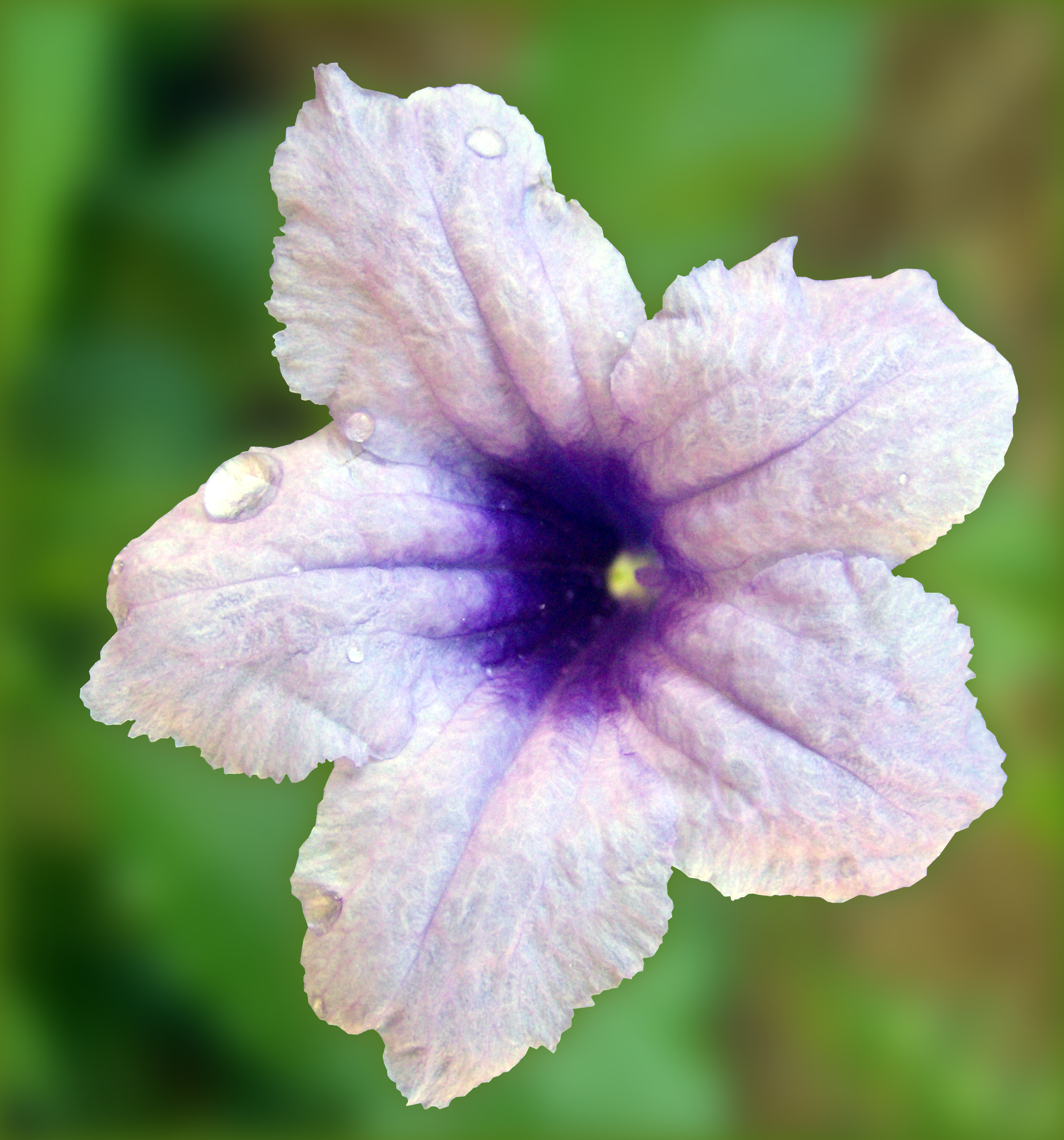 Acanthaceae morada encontrada en la isla de Margarita, Venezuela